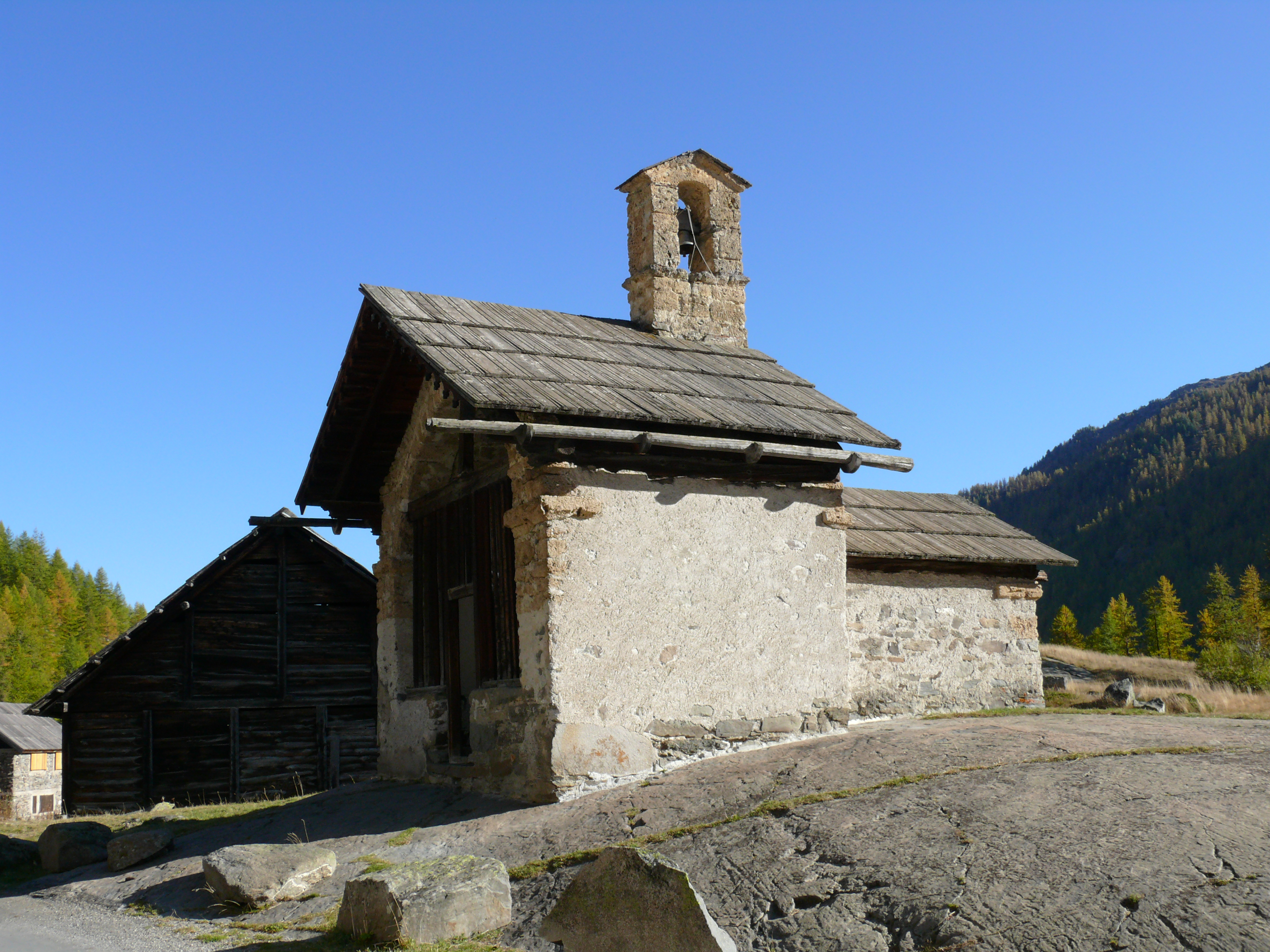 Névache - Vallée de la Clarée - Chapelle Sainte-Marie de Foncouverte